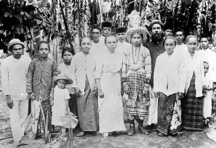 Repronegatief. Besnijdenisfeest te Gorontalo, Manado, Noord-Celebes